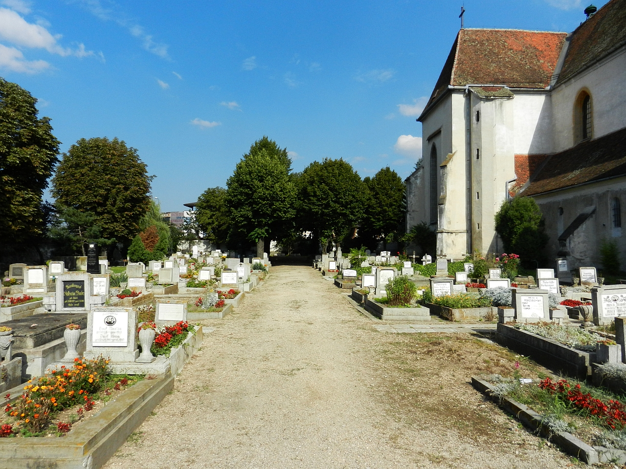 Cimitirul bisericii evanghelice „Sf. Bartolomeu” 02